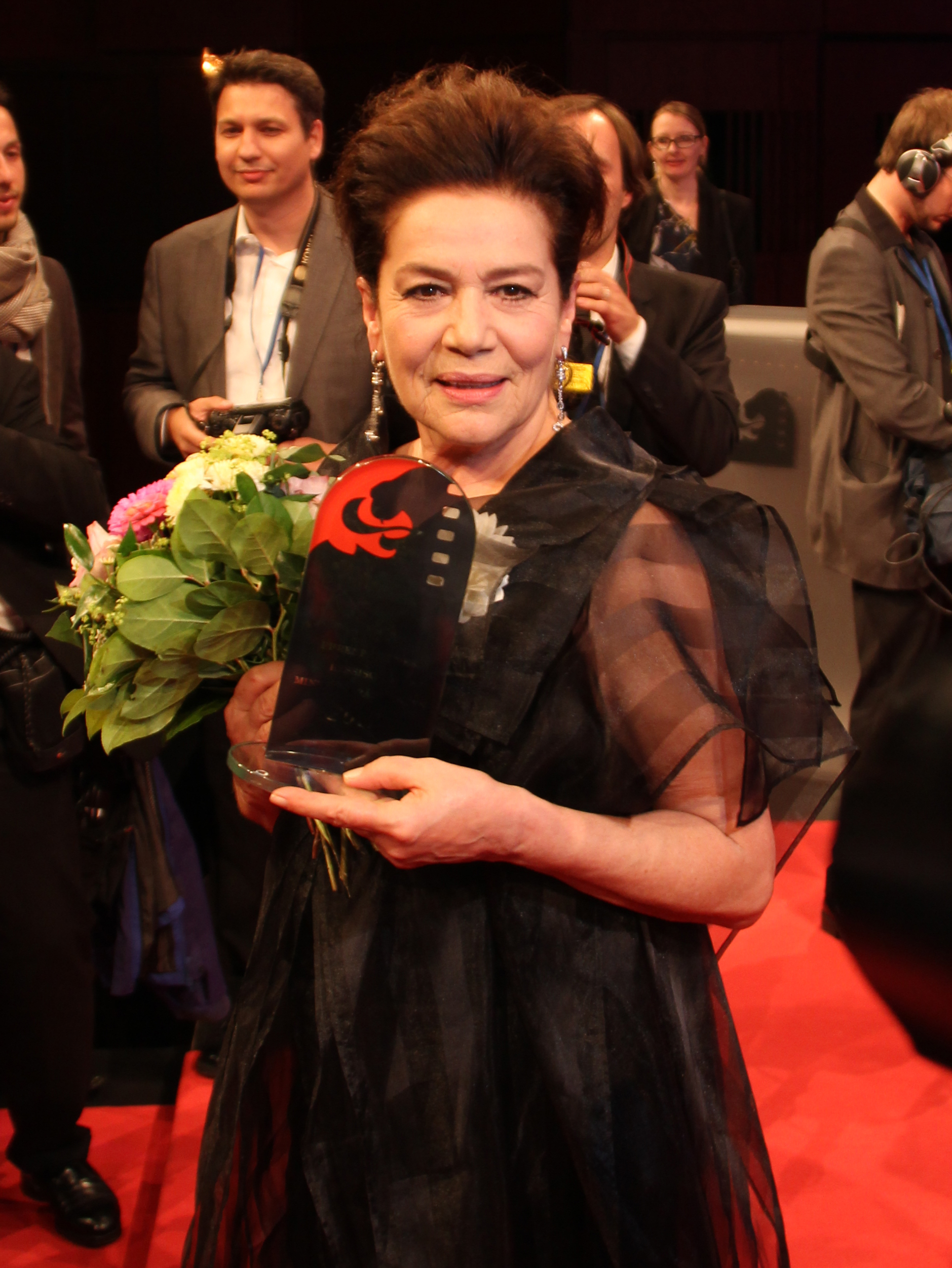 Preisträgerin Hannelore Elsner beim Hessischen Film- und Kinopreis 2012